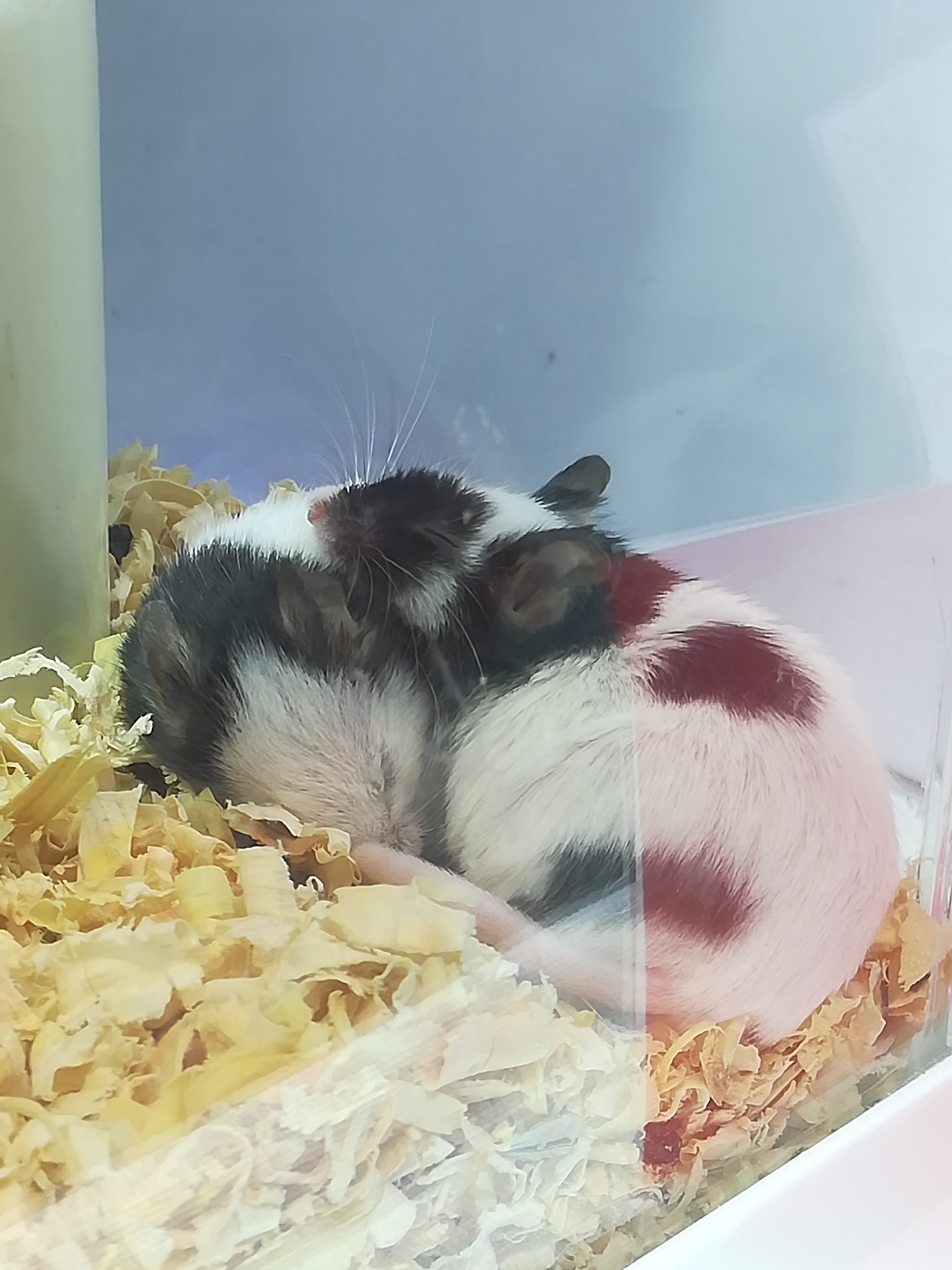 えのすいのマンスリー水槽で展示されていた、ジャパニーズファンシーマウス